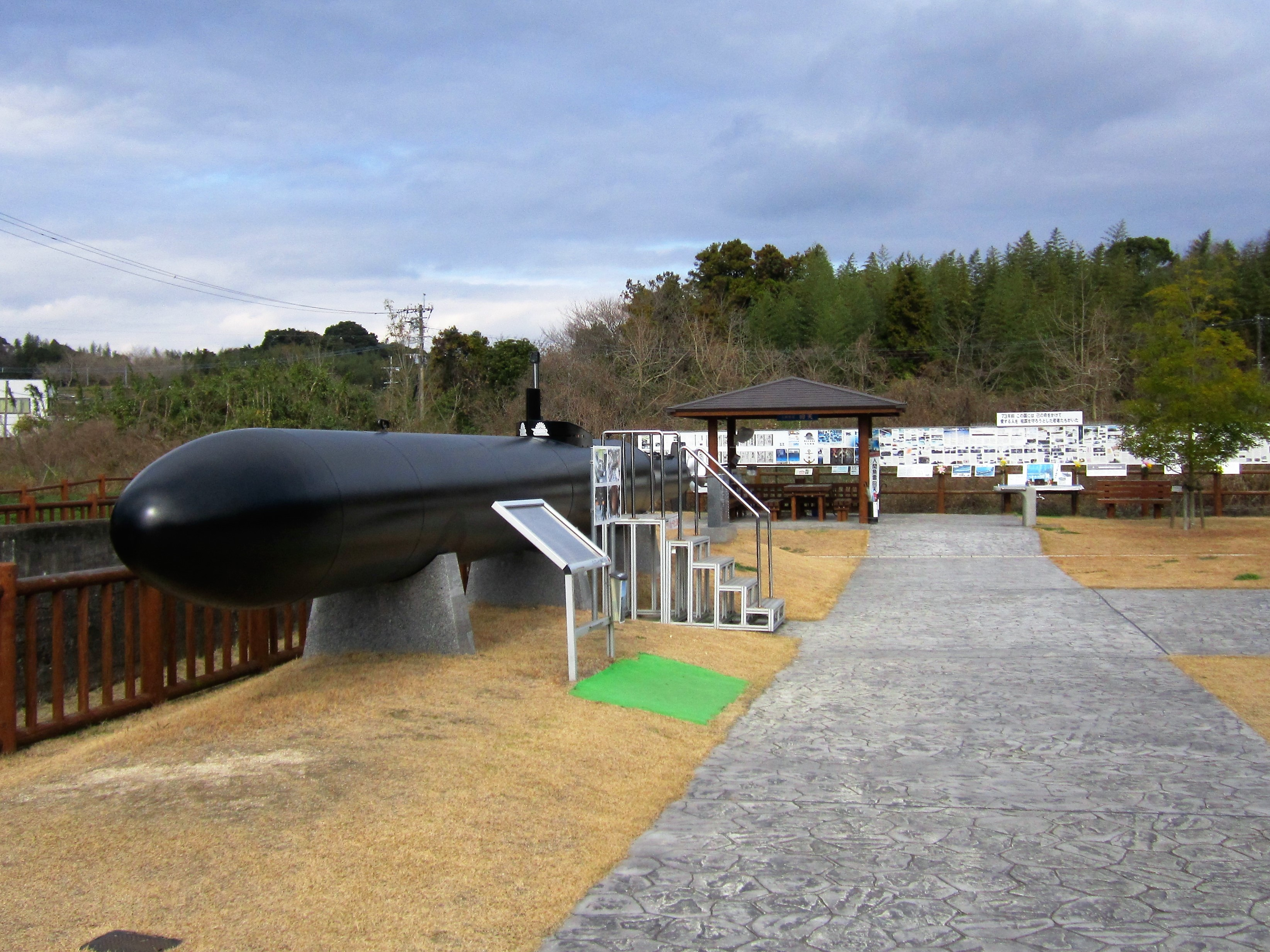 「回天」大神訓練基地跡（回天大神訓練基地記念公園）にある回天実物大模型 Canon PowerShot A2200